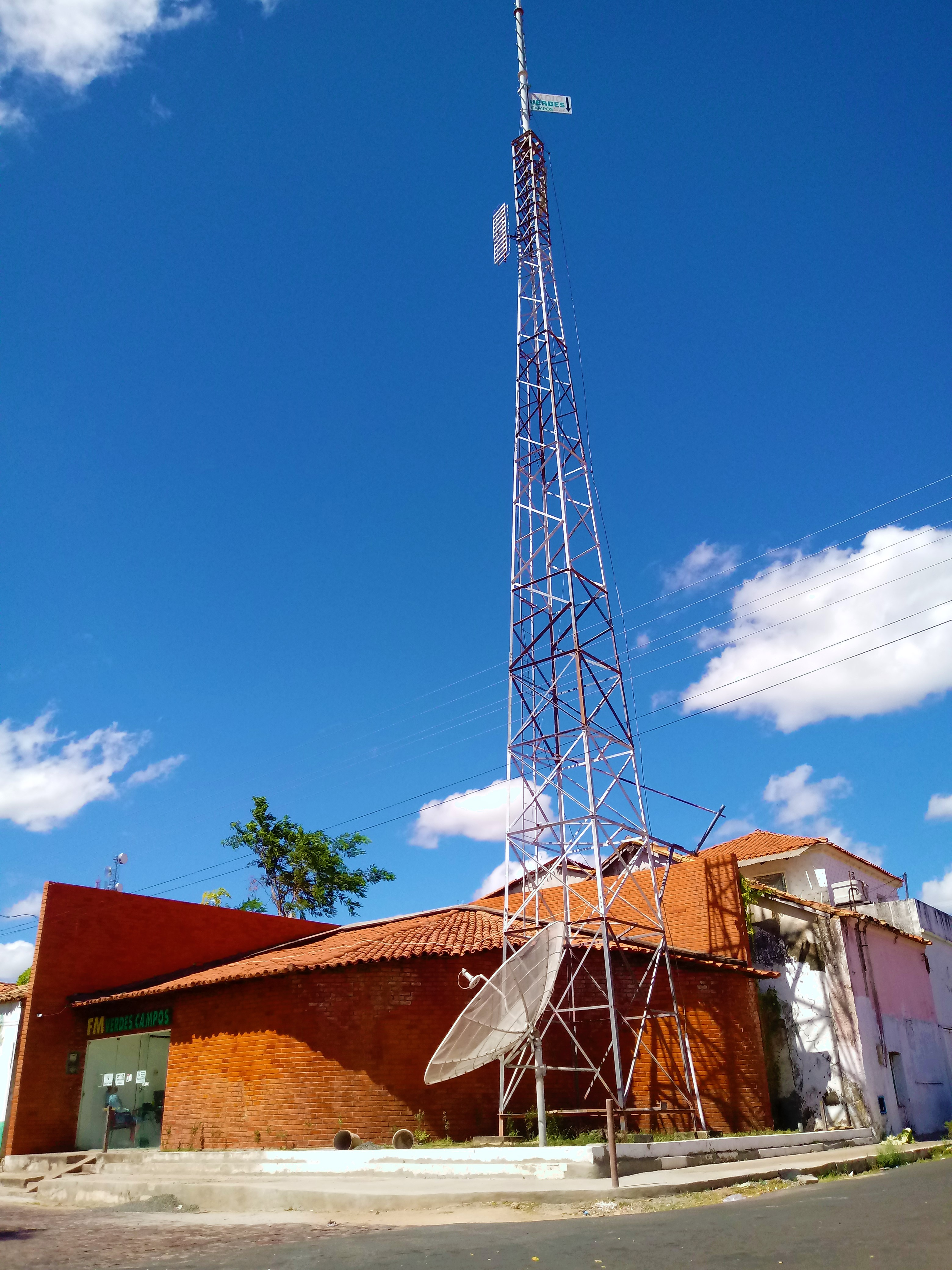 Sede da Verdes Campos FM - Rede Verdes Campos Sat, em Campo Maior.